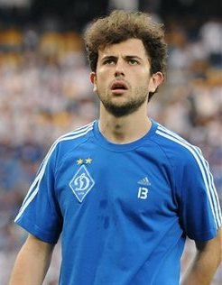 Адмір Мехмеді - швейцарський футболіст київського Динамо